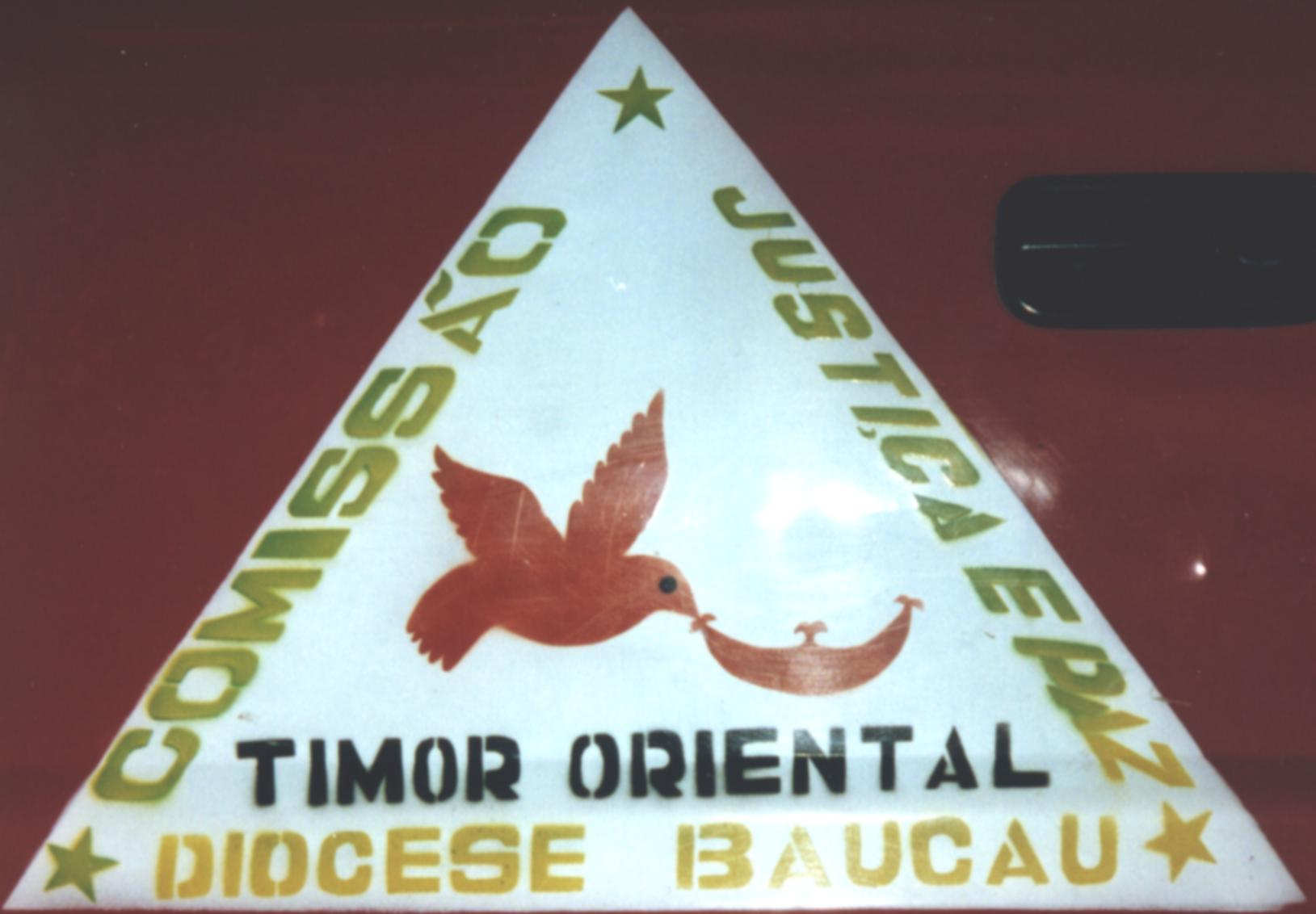 Logo der Kommission für Recht & Frieden der Diözese Baucau auf einem Wagen